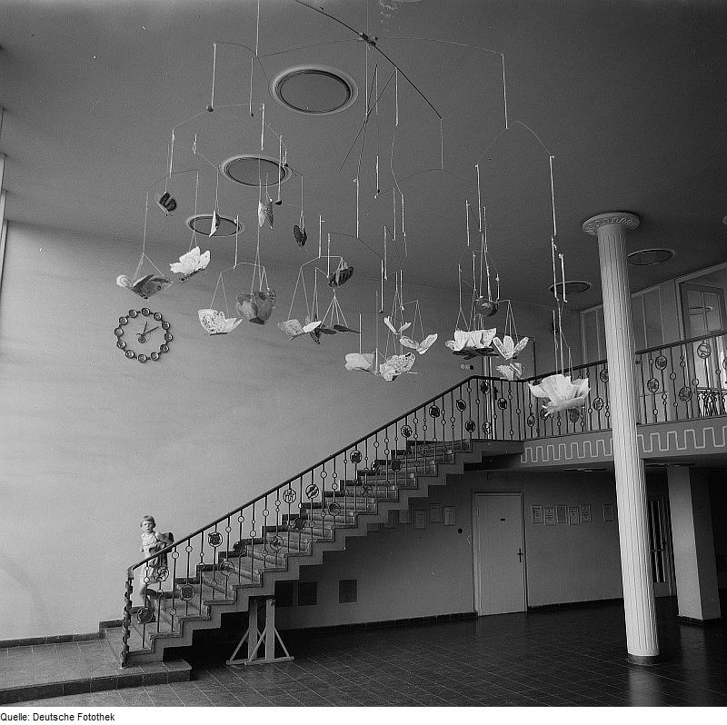 Original image description from the Deutsche Fotothek Saßnitz. Polytechnischen Oberschule (POS), Vestibül (von Grundmann und Henselmann, 1953 eingeweiht)